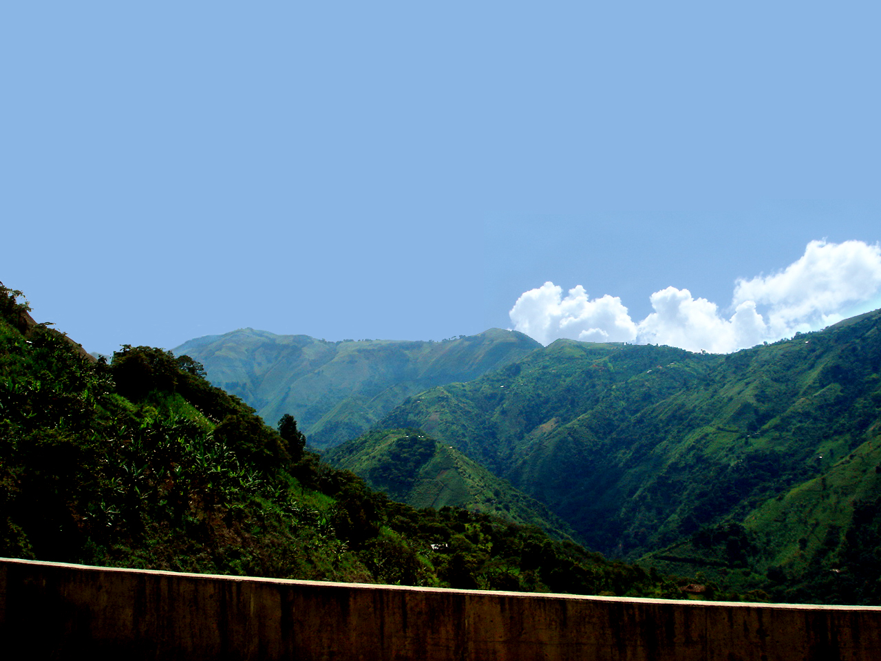 Interminables montañas componen gran parte de la geografía de Antioquia Taken and edited by uploader on November 16, 2002